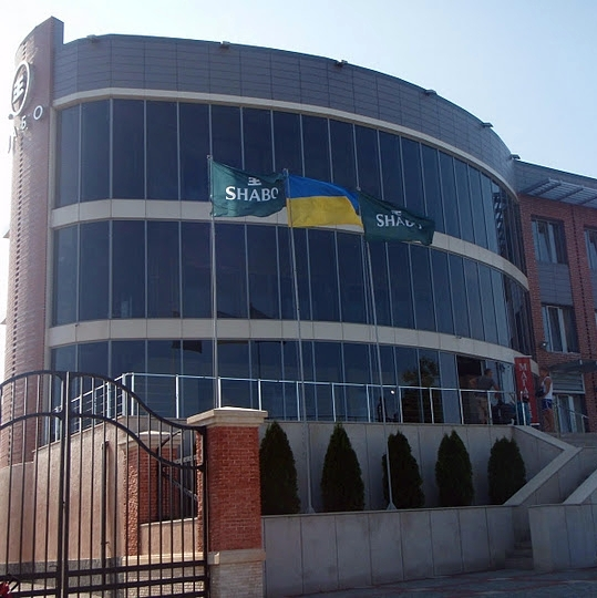 Вхід до Шабського винного заводу